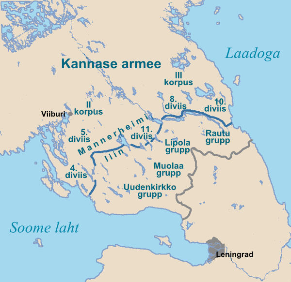 Soome positsioonid Karjala kannases 1939. aastal.